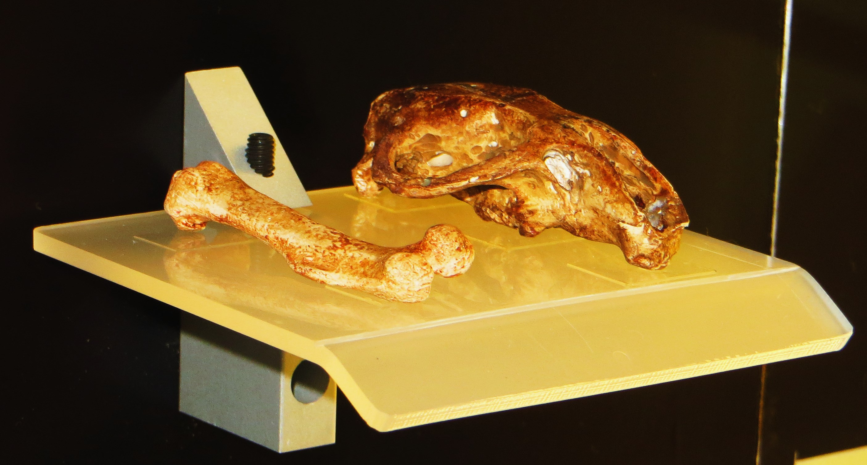 Fossil of Canariomys, an extinct mammal- Took the picture at Museo de la Naturaleza y el Hombre - Tenerife